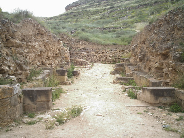 Contrebia_Leukade_Puerta